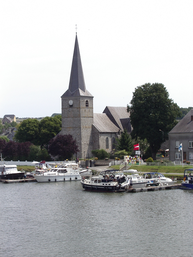 Eglise Notre Dame